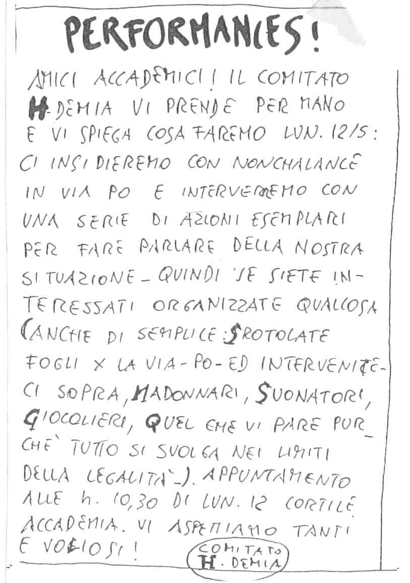 Appel à manifester pour la réforme de l'enseignement artistique en Italie.